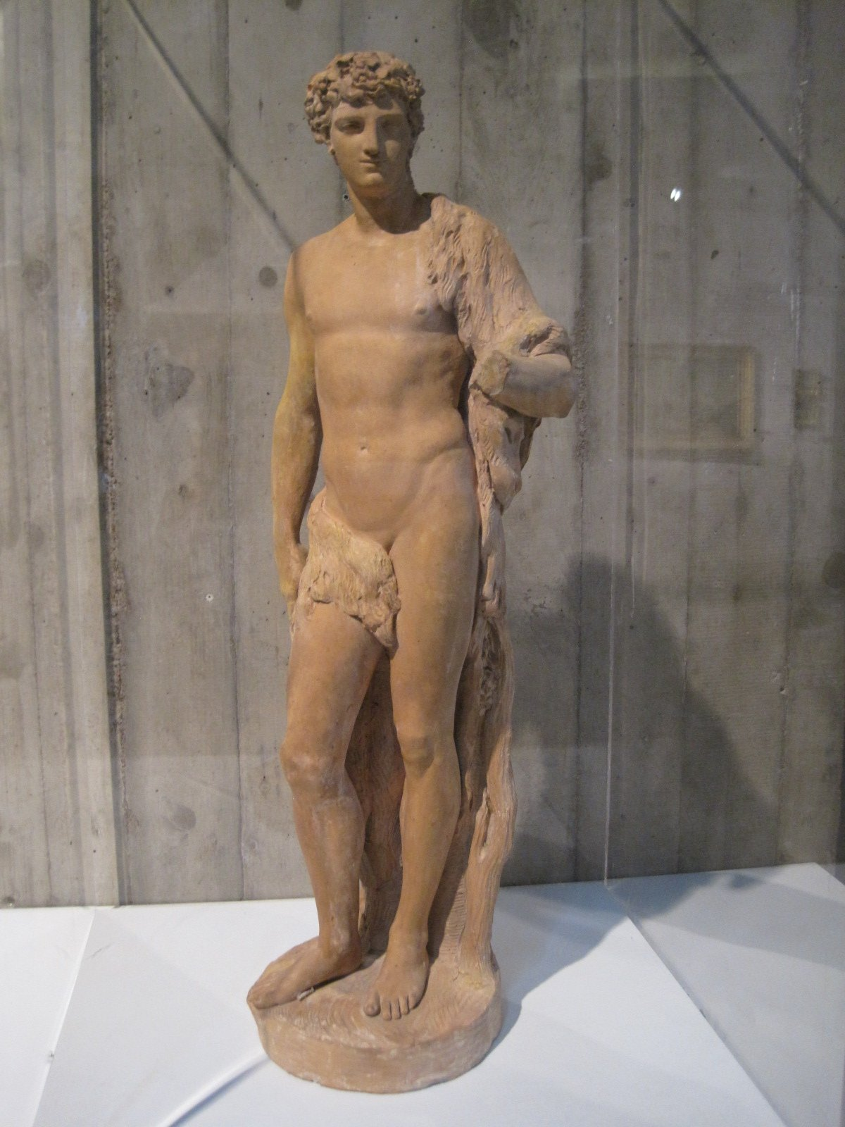 Bacchus - Terre cuite par Nicolas Delaistre - Musée des Beaux-Arts de Besançon